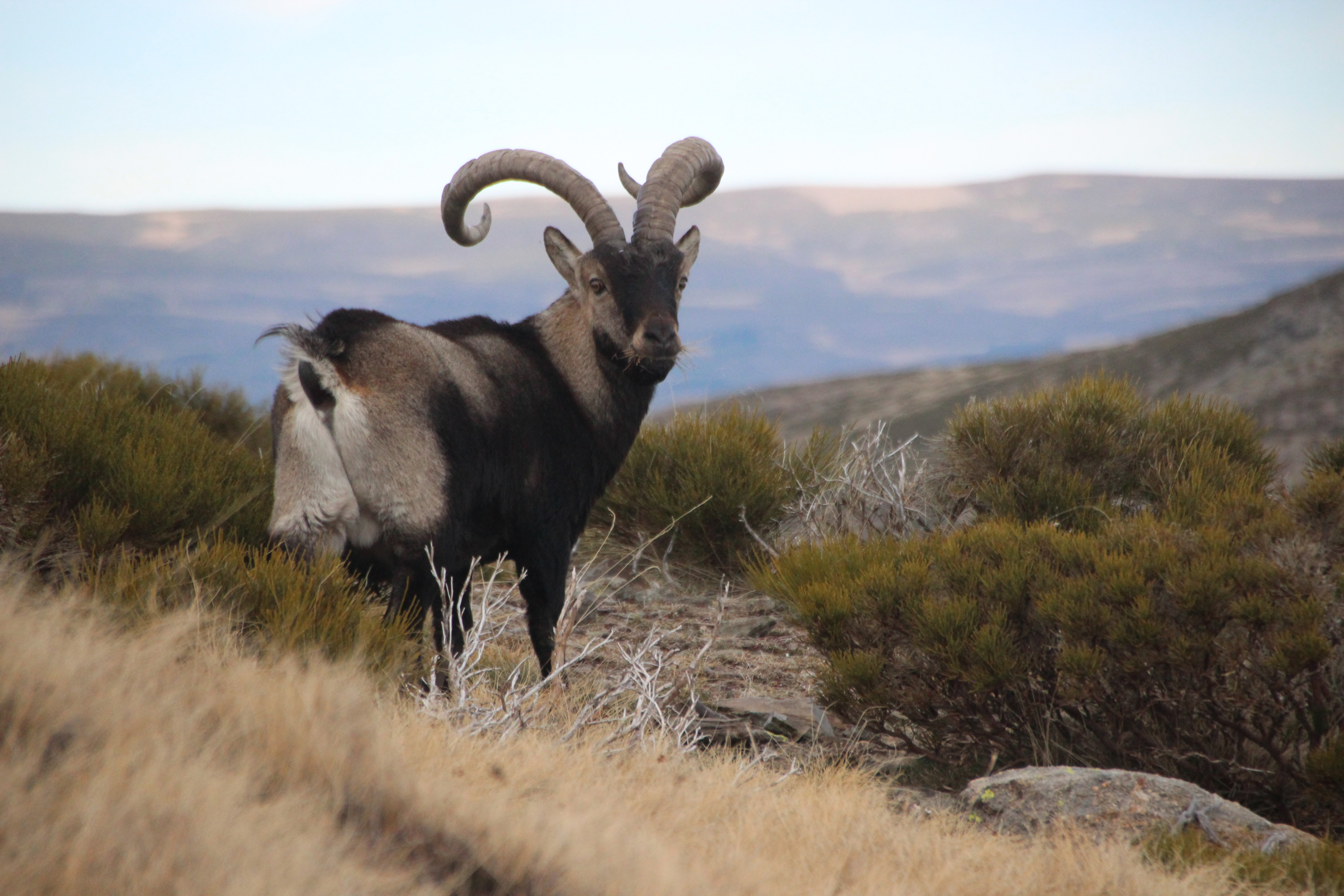 Una cabra en la Sierra de Gredos.